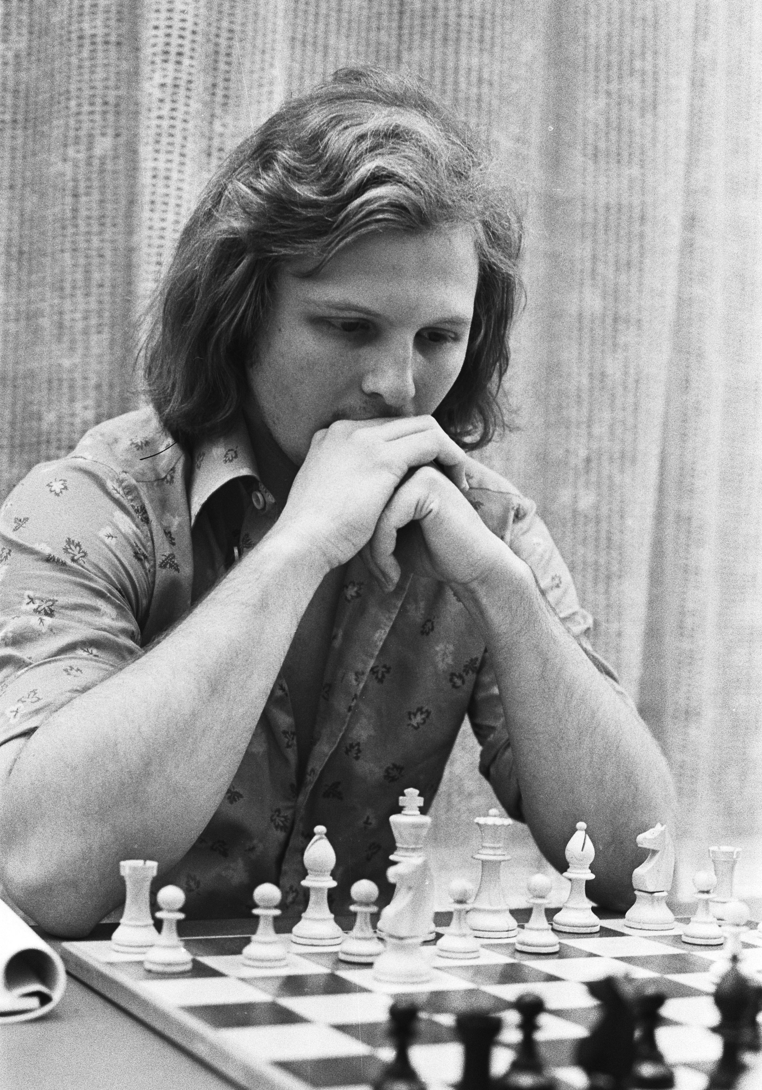 IBM-toernooi 1976, Anthony Miles in aktie kop.